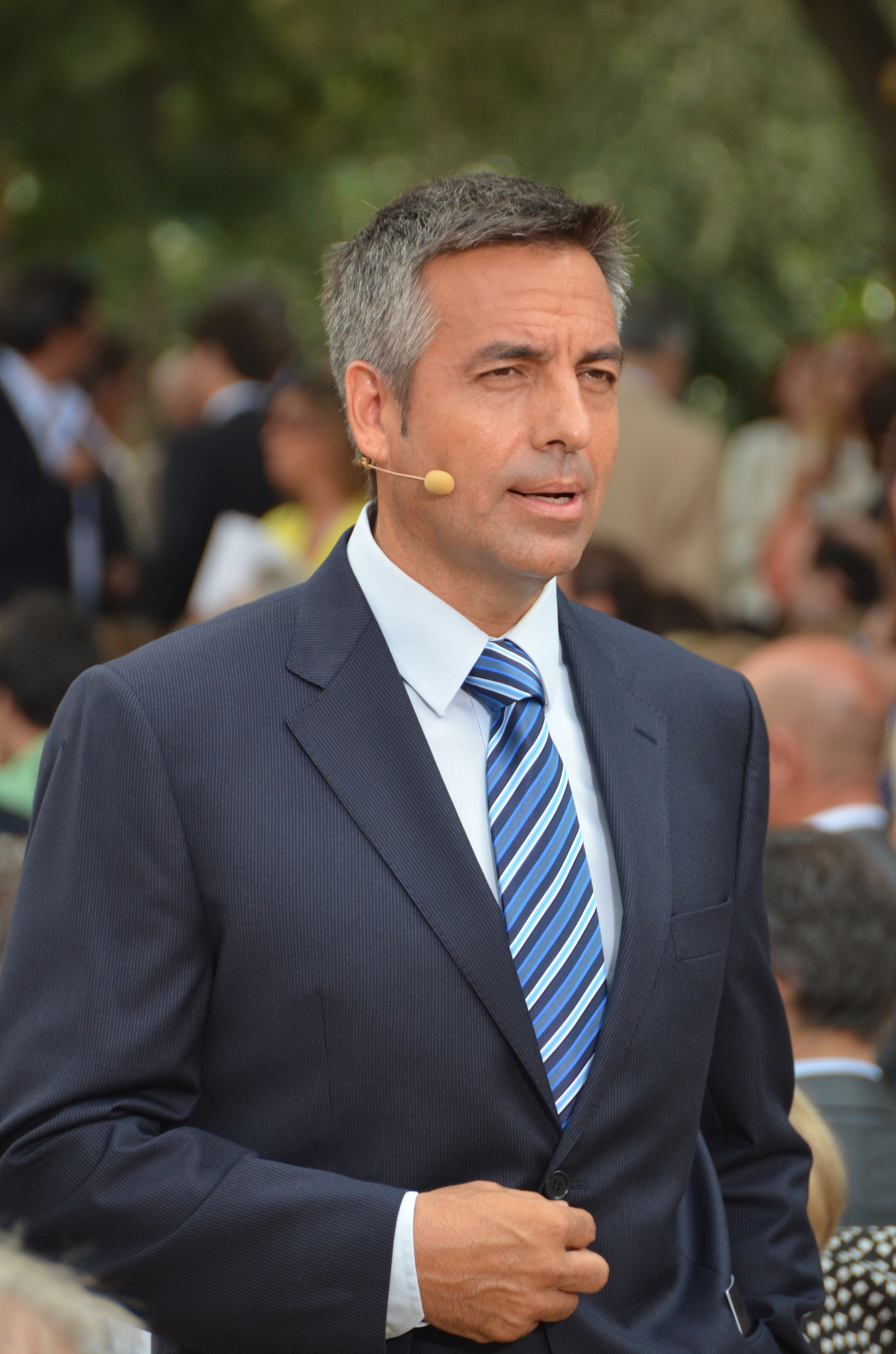 Ramon Pellicer, periodista de TV3, a la diada de l'11 de setembre de 2012